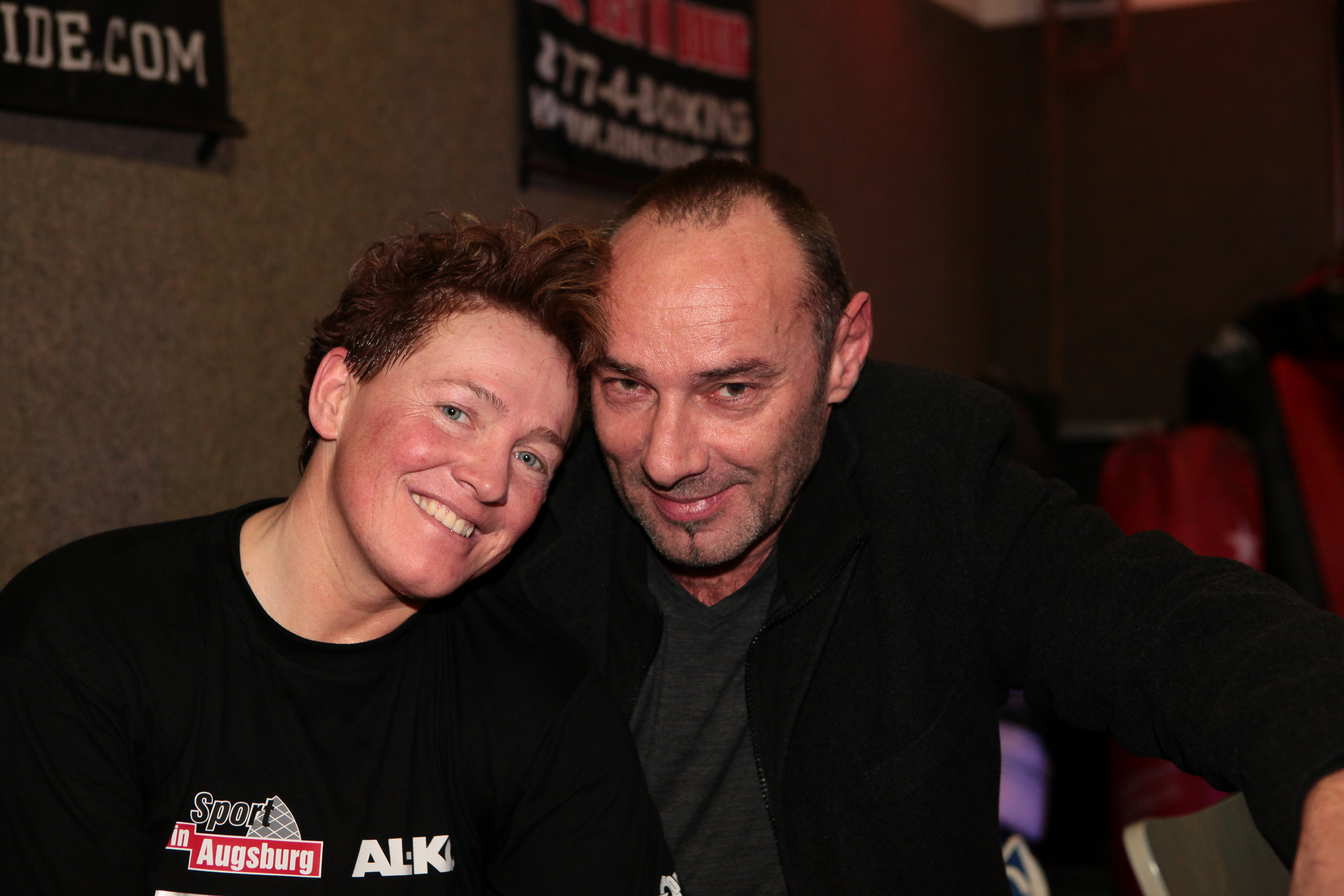 Tina Schüßler mit ihrem Freund und Lebenspartner Clemens Brocker (Unternehmer und Künstler) in Augsburg nach dem TV-Live-Auftritt beim Brechtfestival 2014